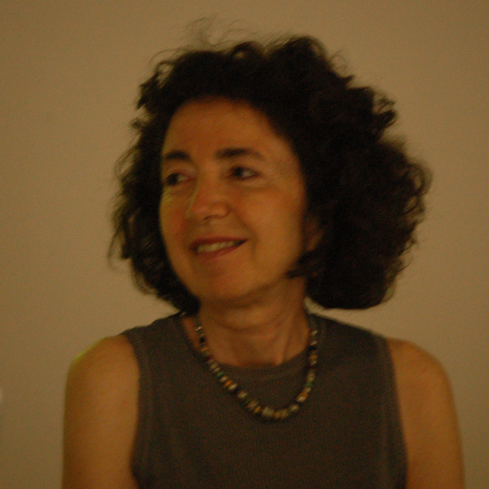 Marilar Aleixandre na sala Sargadelos de Pontevedra Categoría:Imaxes de Marilar Aleixandre